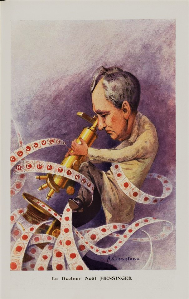 Le Docteur Noël Fiessinger [Caricature par A. Chanteau] Réf. image MEDIC@ : Revue : Chanteclair, 21e année Edition : Romainville : Carnine Lefrancq, 1926